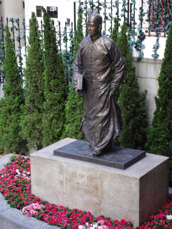 中文（香港）: 孫中山銅像